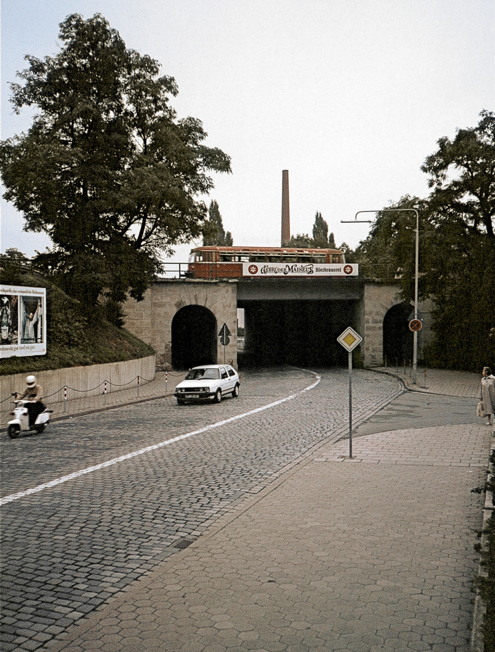 Tunnelstraße Bayreuth 1987